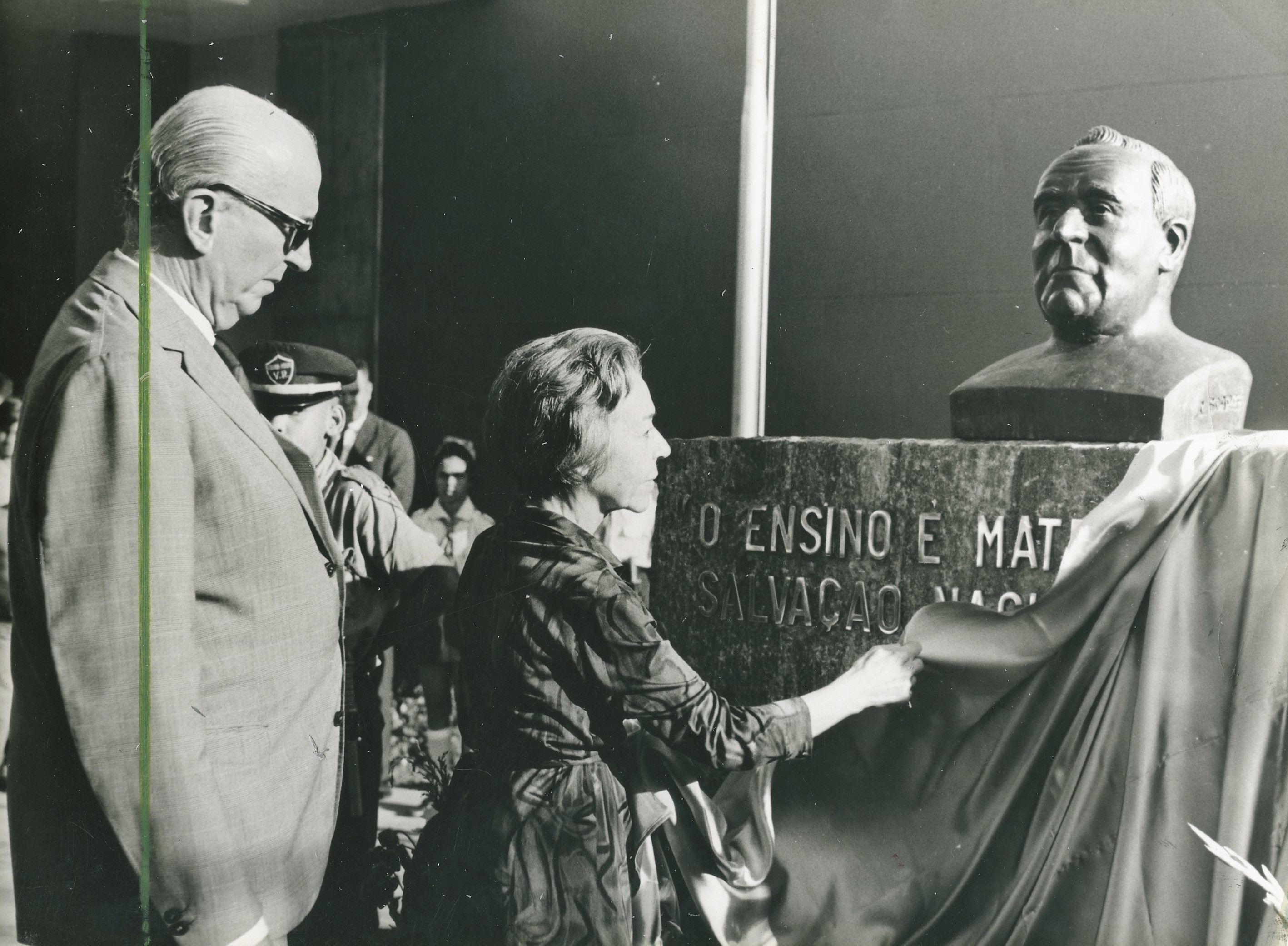 Fotografia do Fundo Correio da Manhã, sob a guarda do Arquivo Nacional.